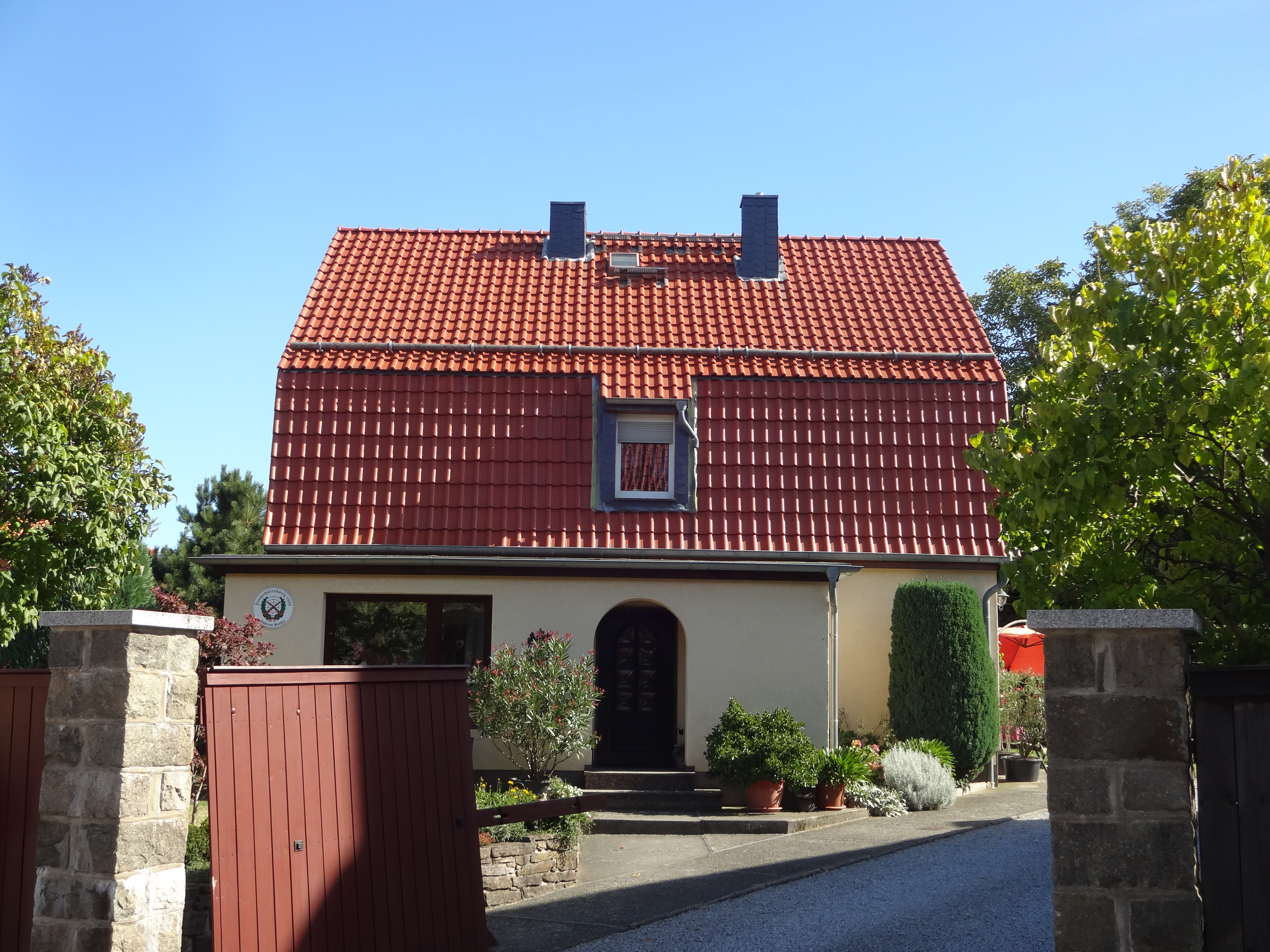 ehemals denkmalgeschütztes Wohnhaus in der Hauptstraße 5 in Drübeck